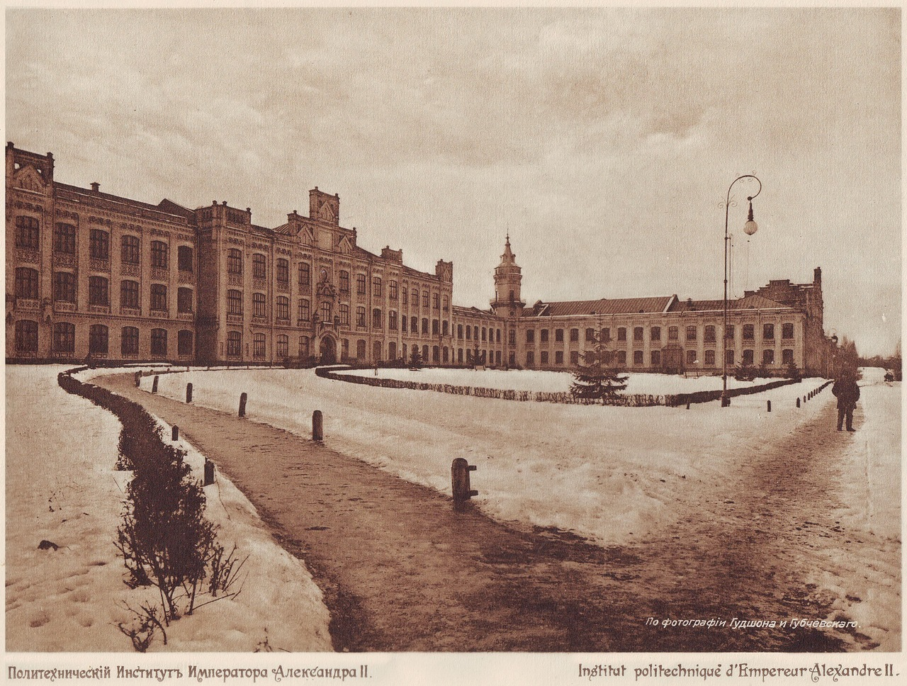 Політехнічний інститут Київ 1911